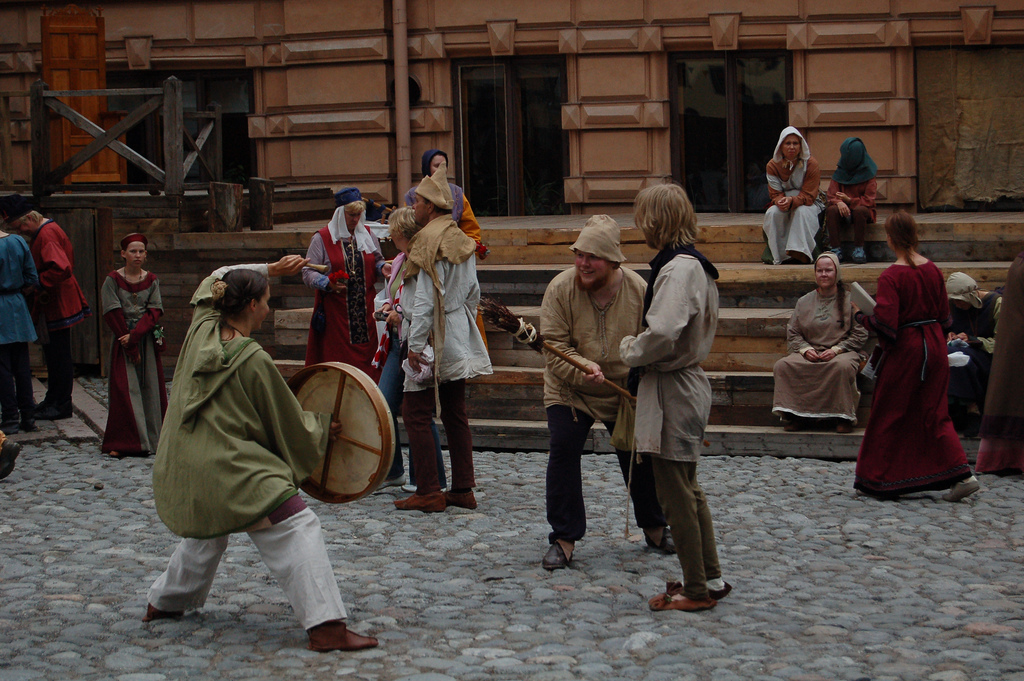 Turku medieval market acting